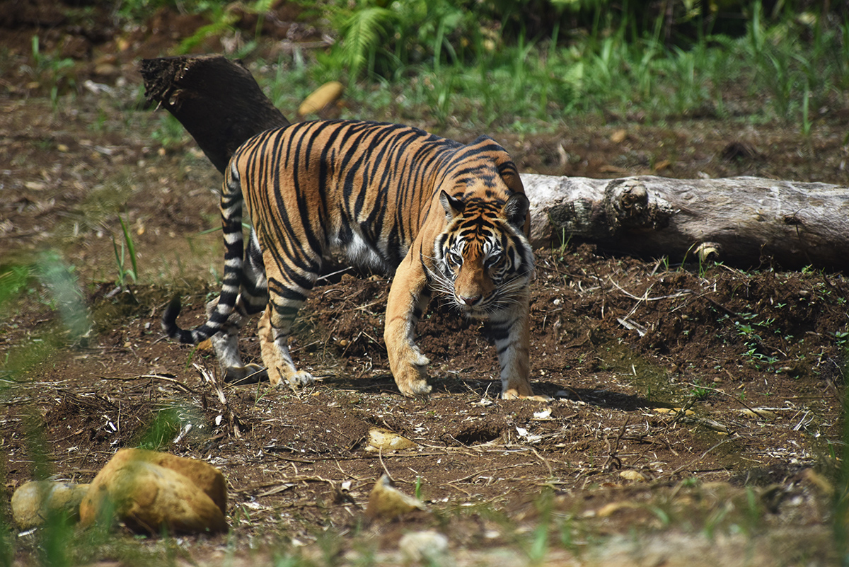 Harimau Sumatra (Panthera tigris sumatrae) di Pusat Rehabilitasi Harimau Sumatra, Dharmasraya